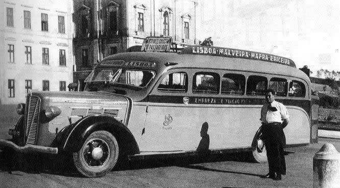 «Um dos primeiros autocarros da Empresa de Viação Mafrense (se não o primeiro) e, na foto, pode ver-se o proprietário e fundador da empresa, João Sardinha Dias, junto da viatura em frente do Palácio-Convento de Mafra.»